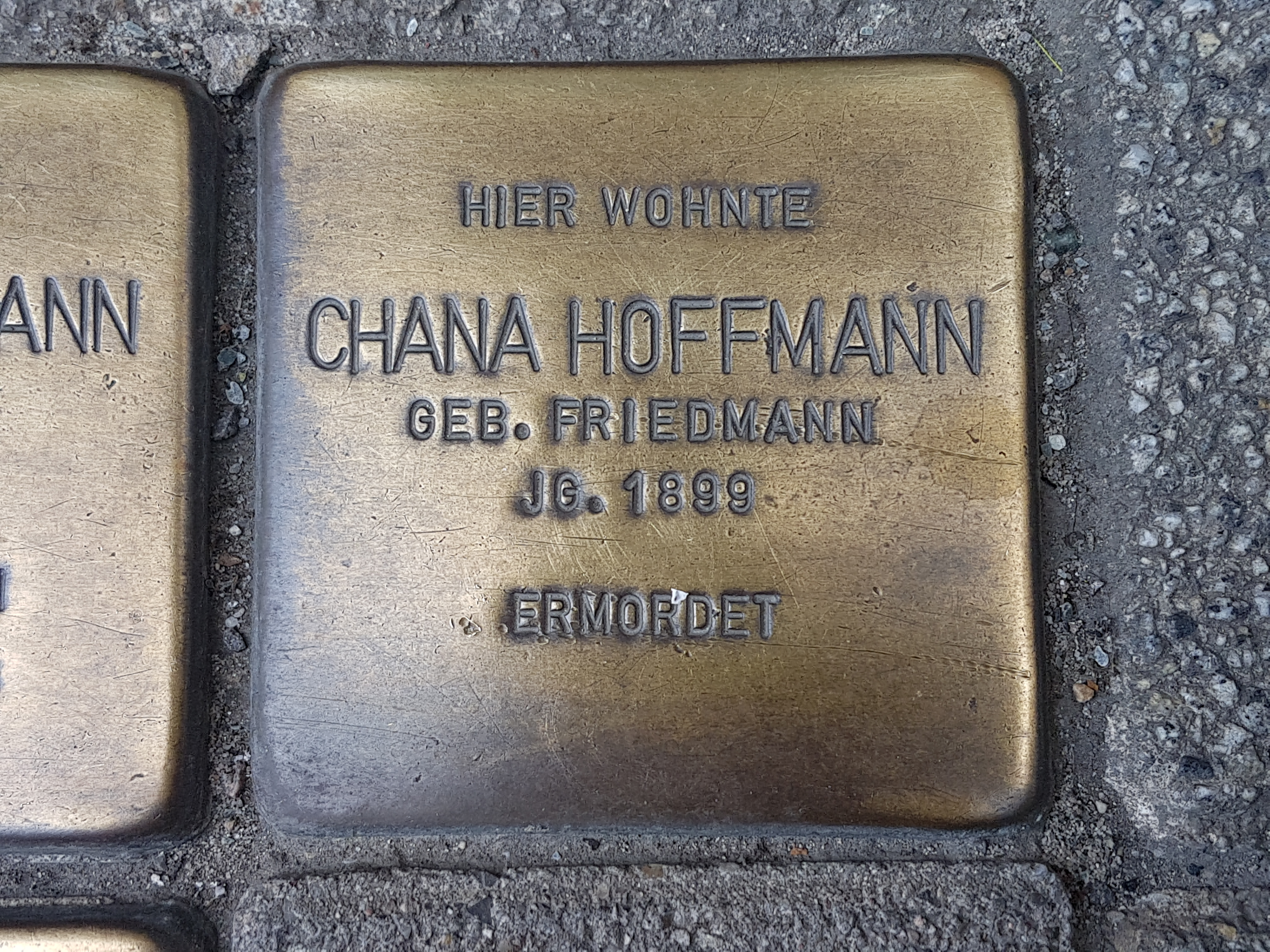 Chana Hoffmann Stolperstein Duisburg